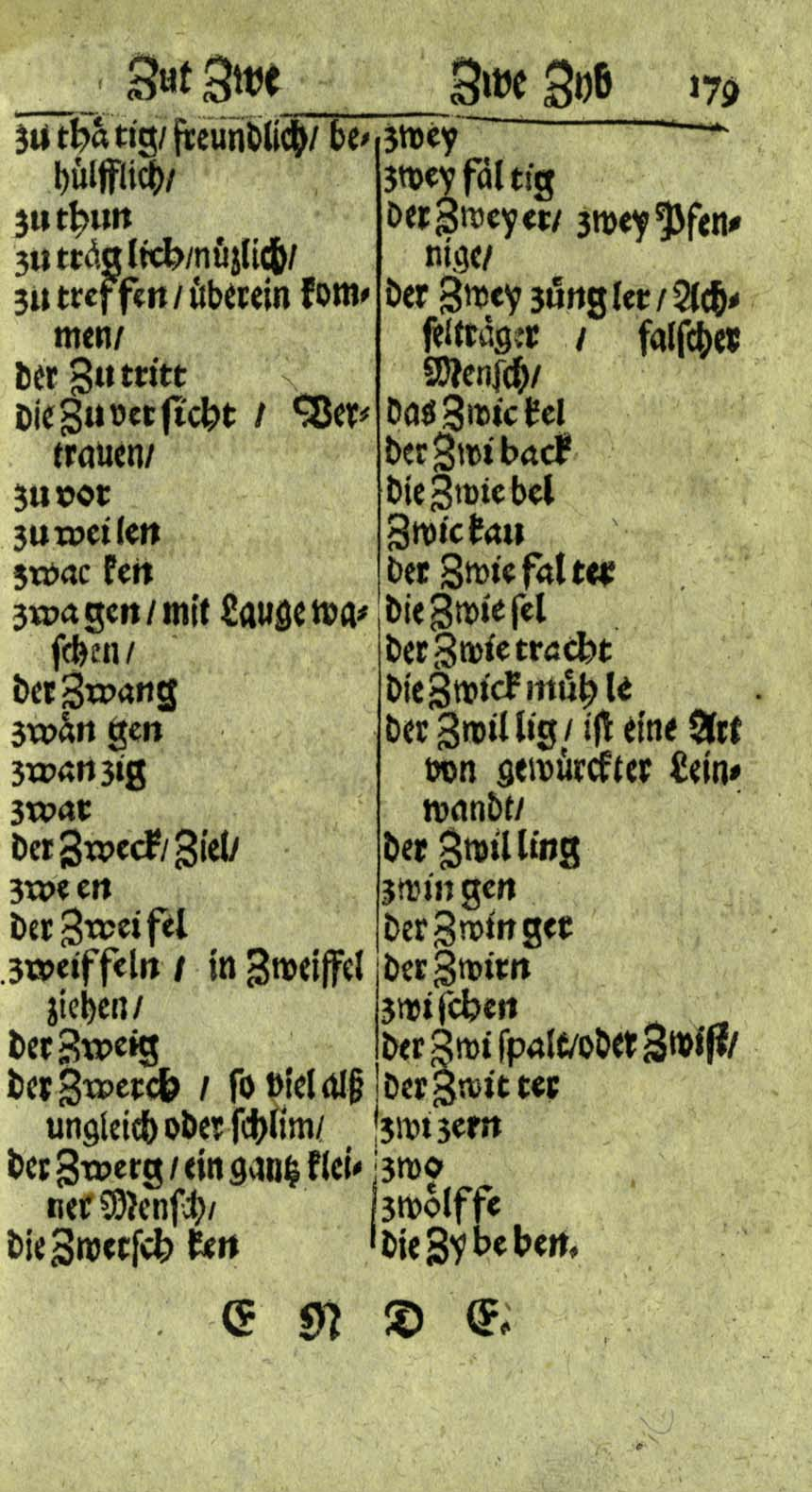 Heinrich Volck von Wertheim: Anweisung zur ORTOGRAPHIA. Chemnitz 1711.